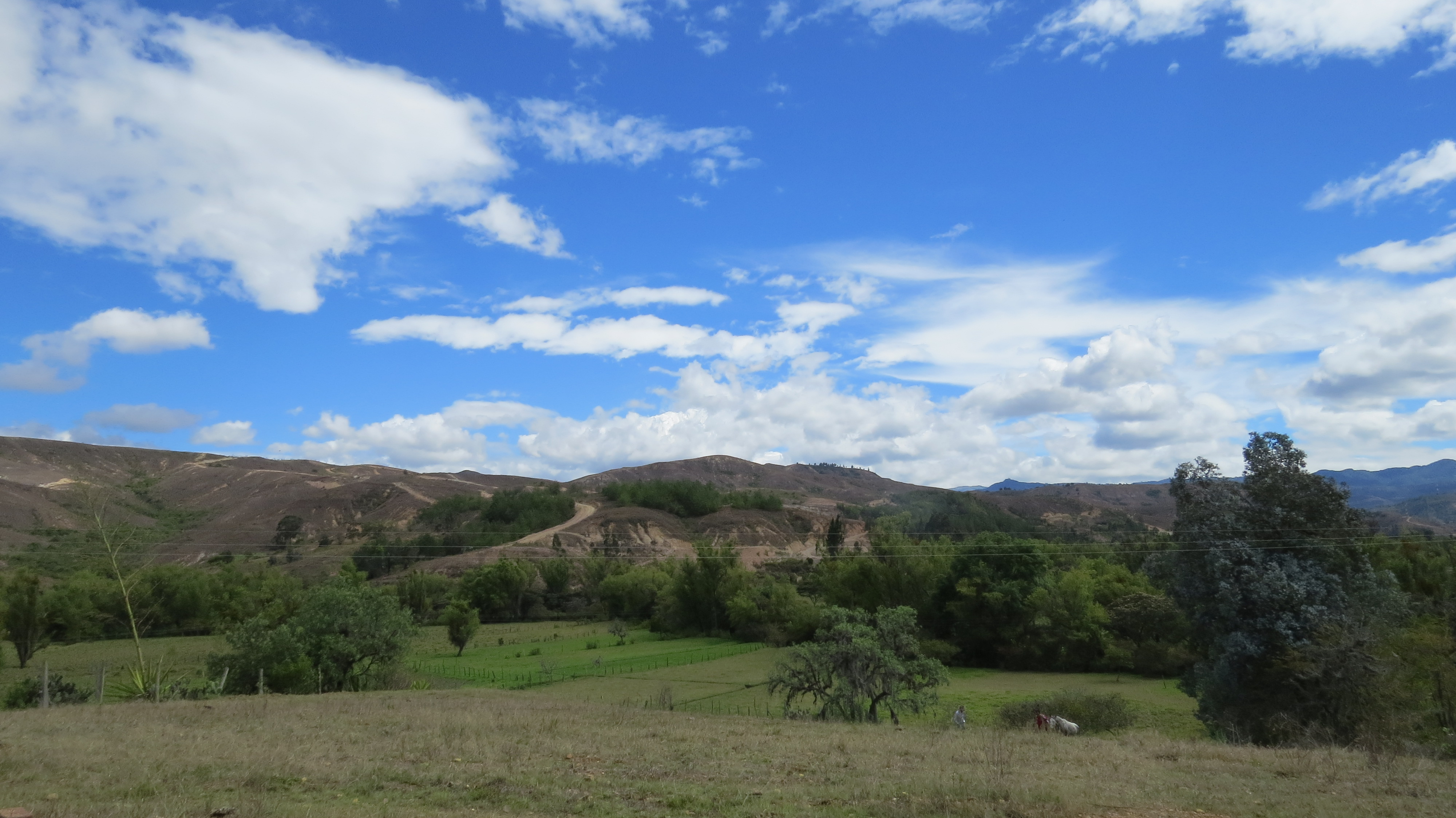 Aunque Boyacá es conocido por sus climas fríos, en Samaca uno puede encontrar el mejor clima del país y un paisaje relajante. Esta fotografía fue tomada en el municipio colombiano con código 15646.